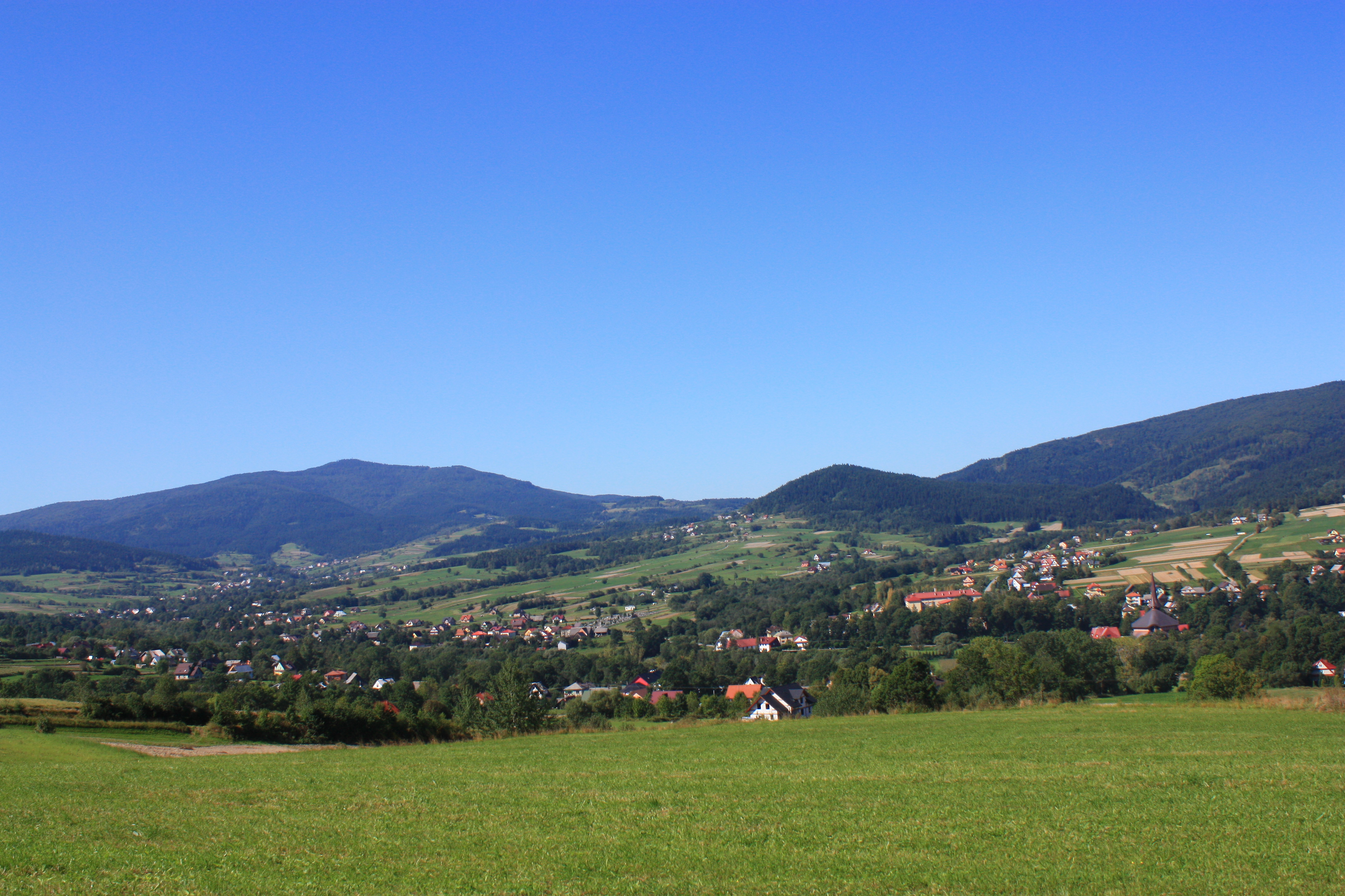 Panorama Słopnic